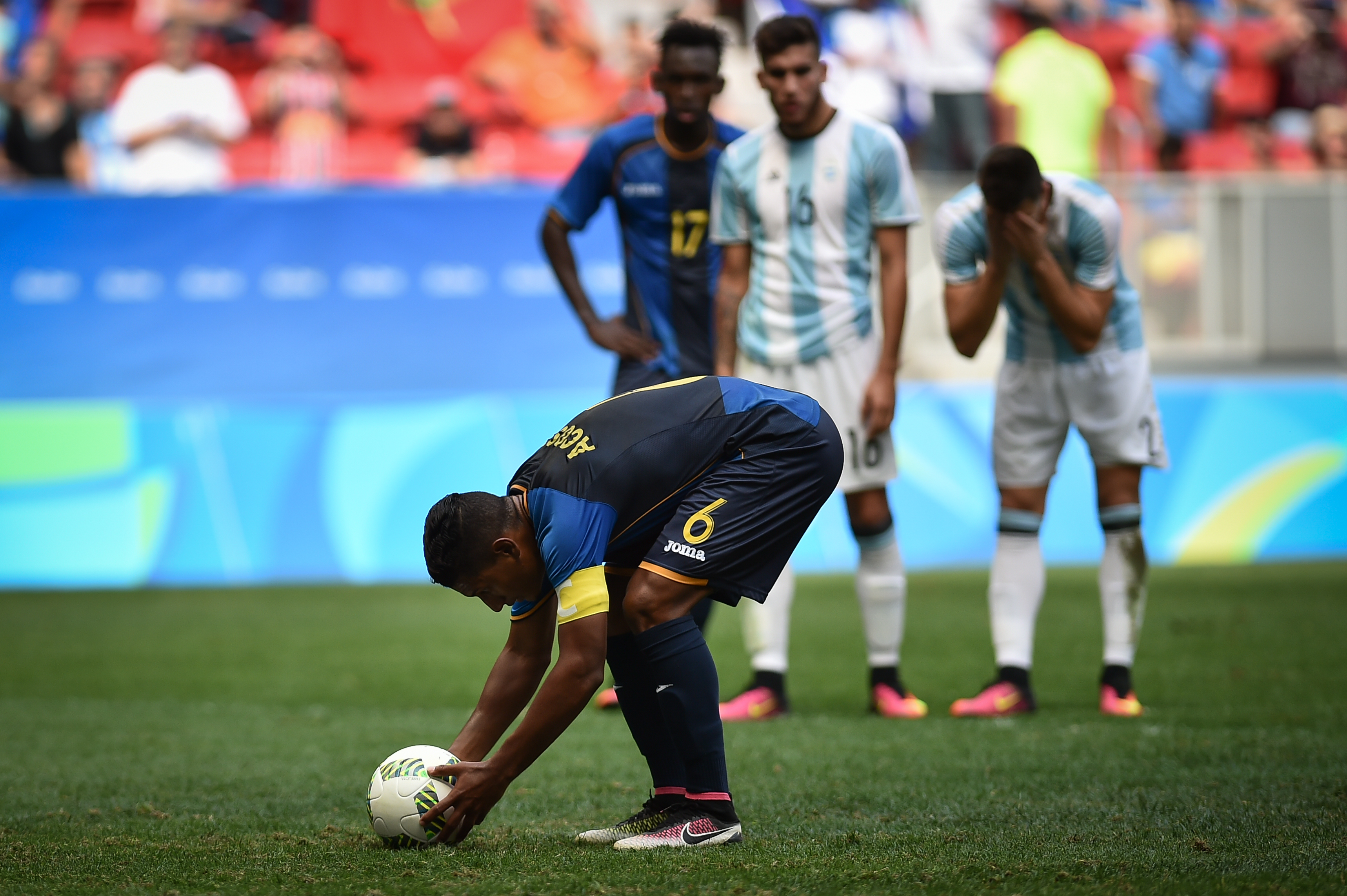 Estádio Nacional de Brasília Mané Garrincha, Brasília, DF, Brasil, 10/8/2016 Foto: Andre Borges/Agência Brasília Argentina e Honduras jogam nesta quarta-feira (10), no Estádio Mané Garrincha, pelo grupo D do futebol masculino nas Olimpíadas 2016.